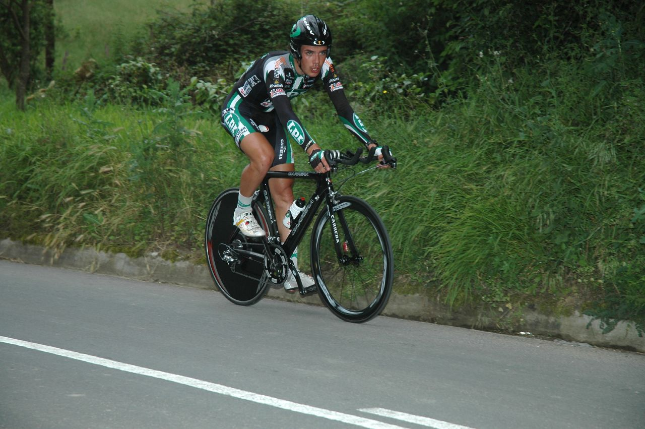 Luca Celli, Euskal Bizikleta 2007